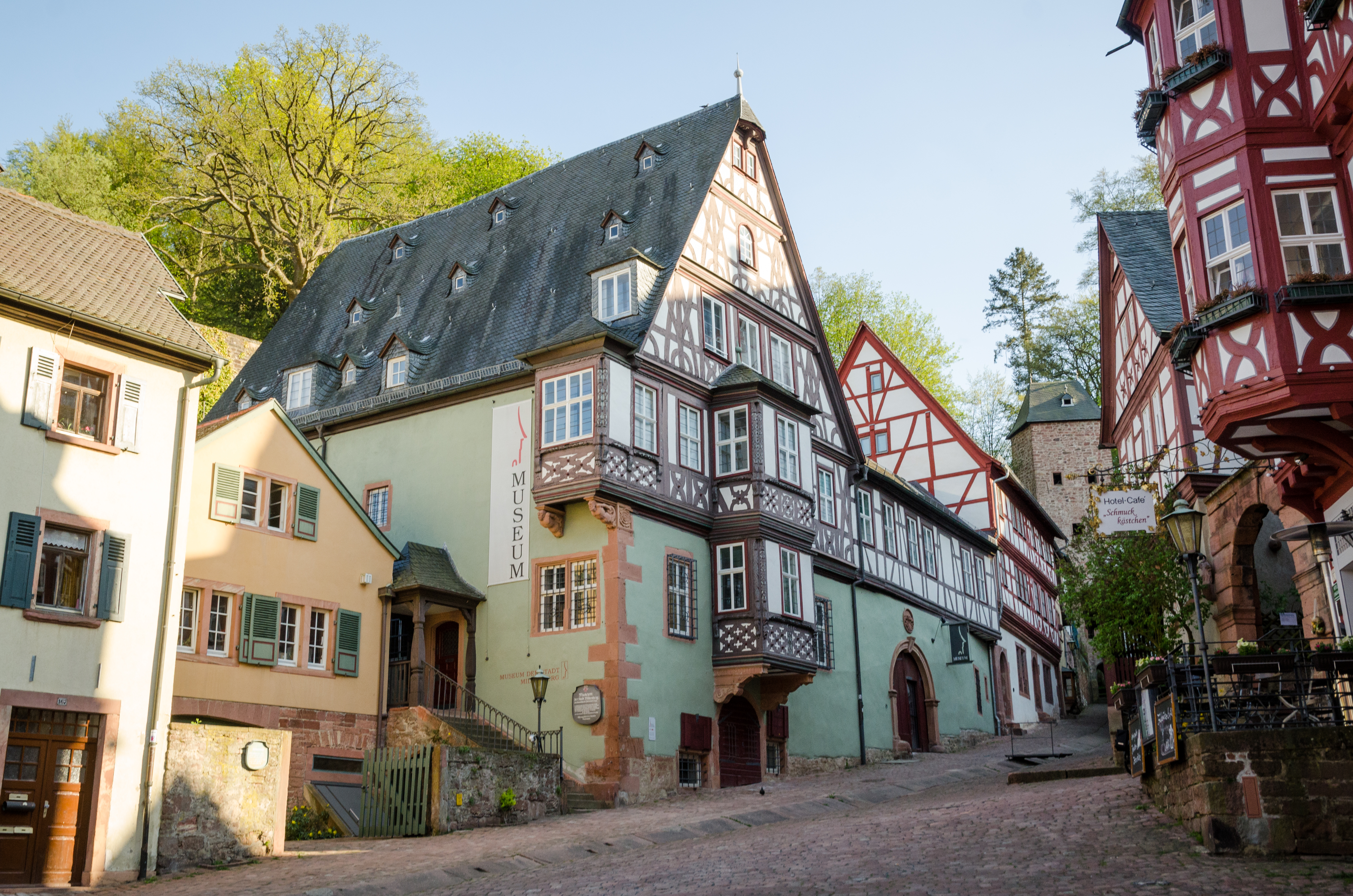 Miltenberg, Hauptstraße 171